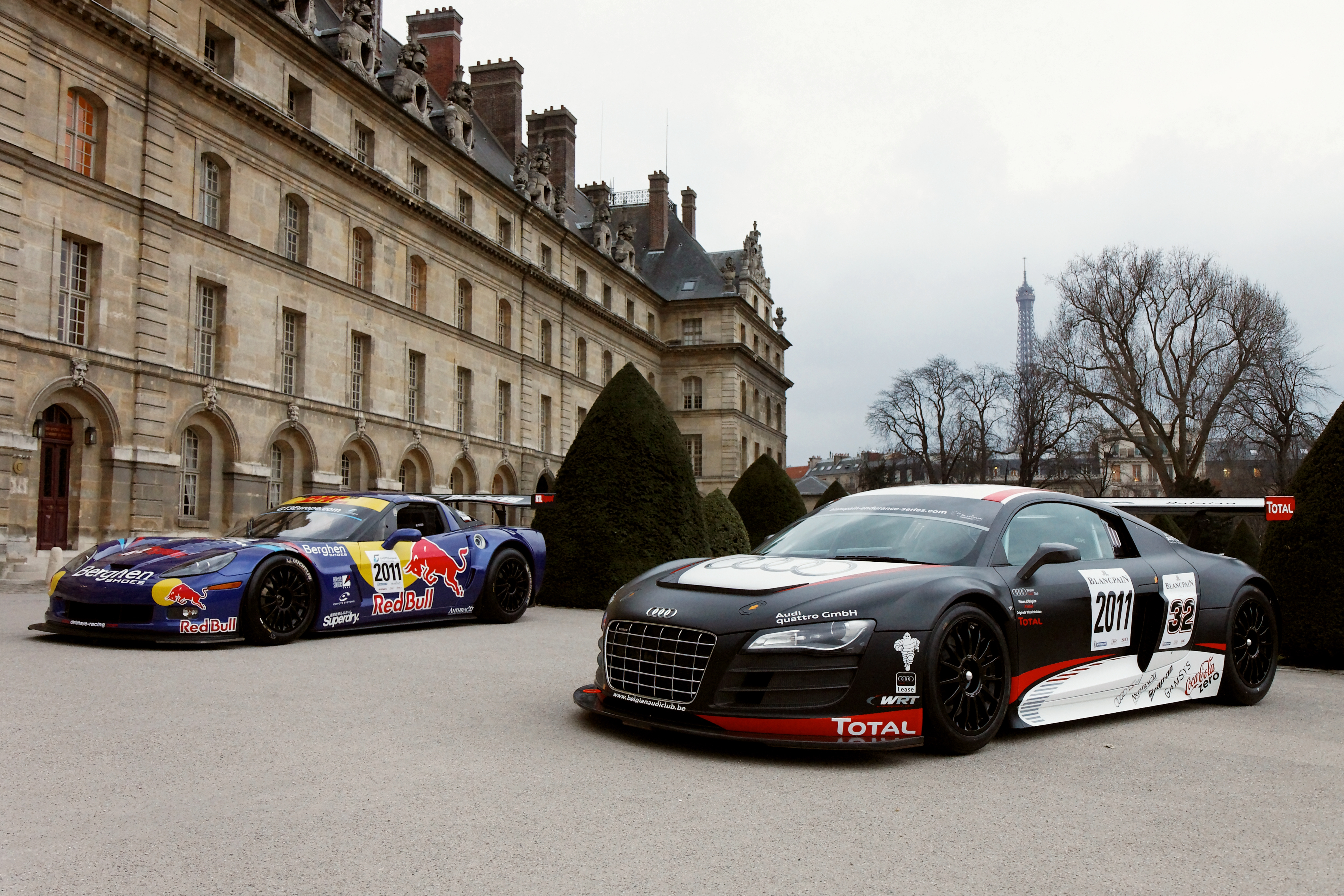 Photographie prise lors de la présentation du Blancpain Endurance series aux Invalides à Paris en mars 2011.